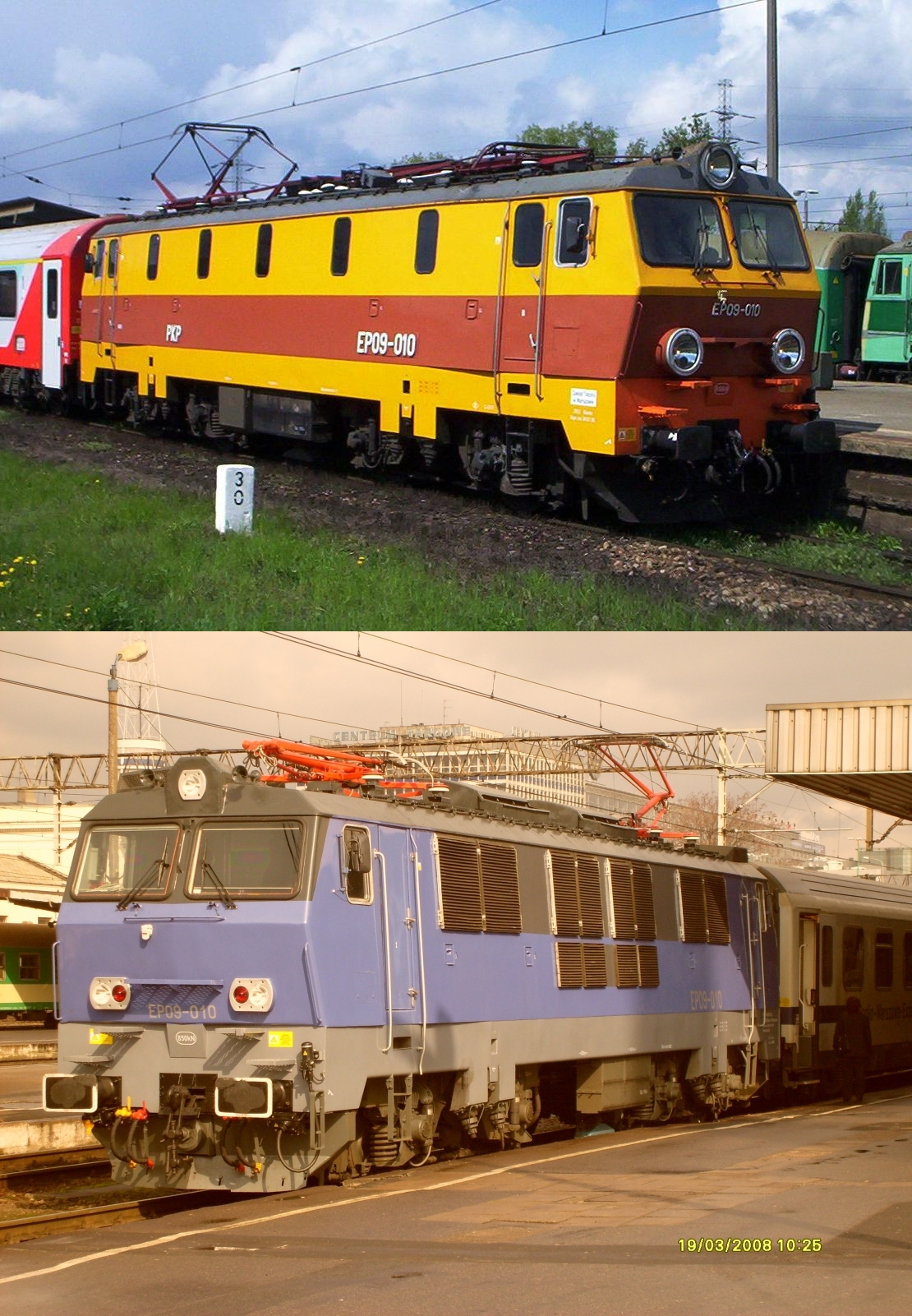 Pasażerska lokomotywa elektryczna EP09-10 przed (u góry) i po modernizacji (na dole)